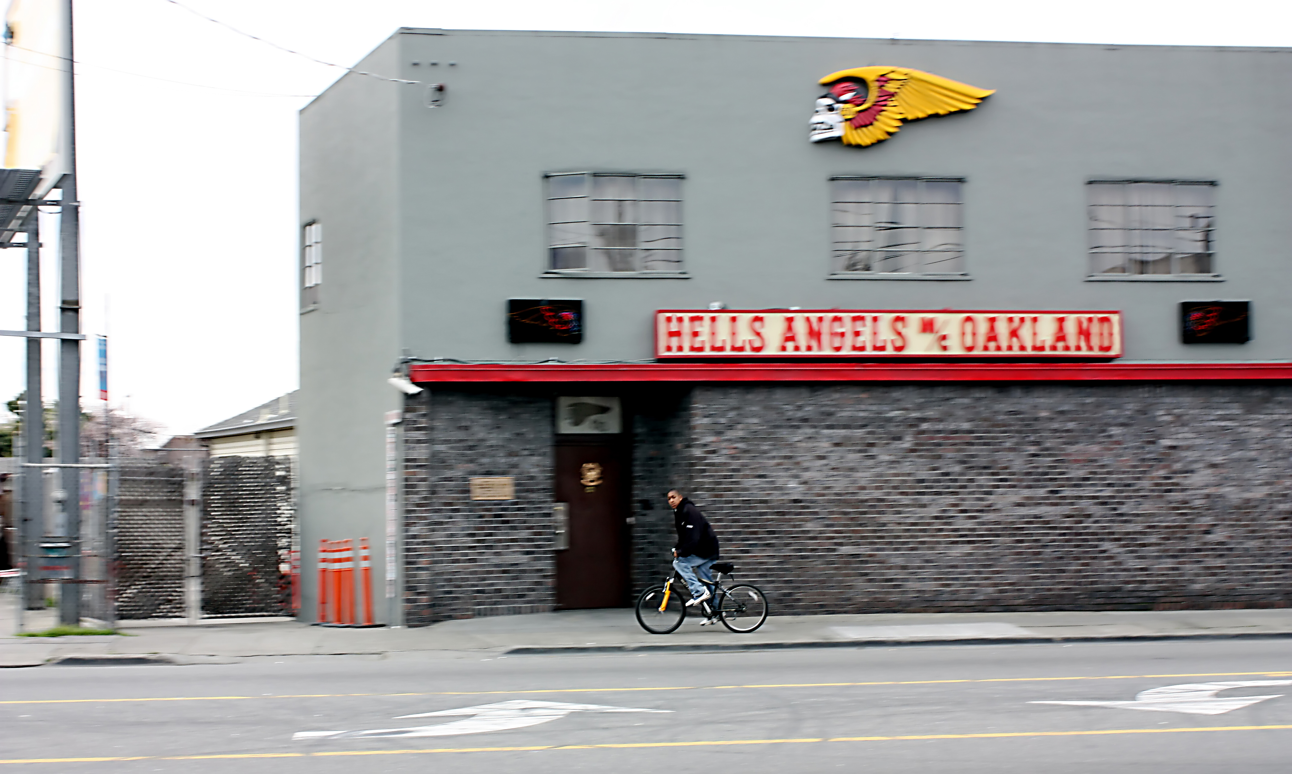 Clubhaus der Hells Angels in Oakland in Kalifornien, USA.